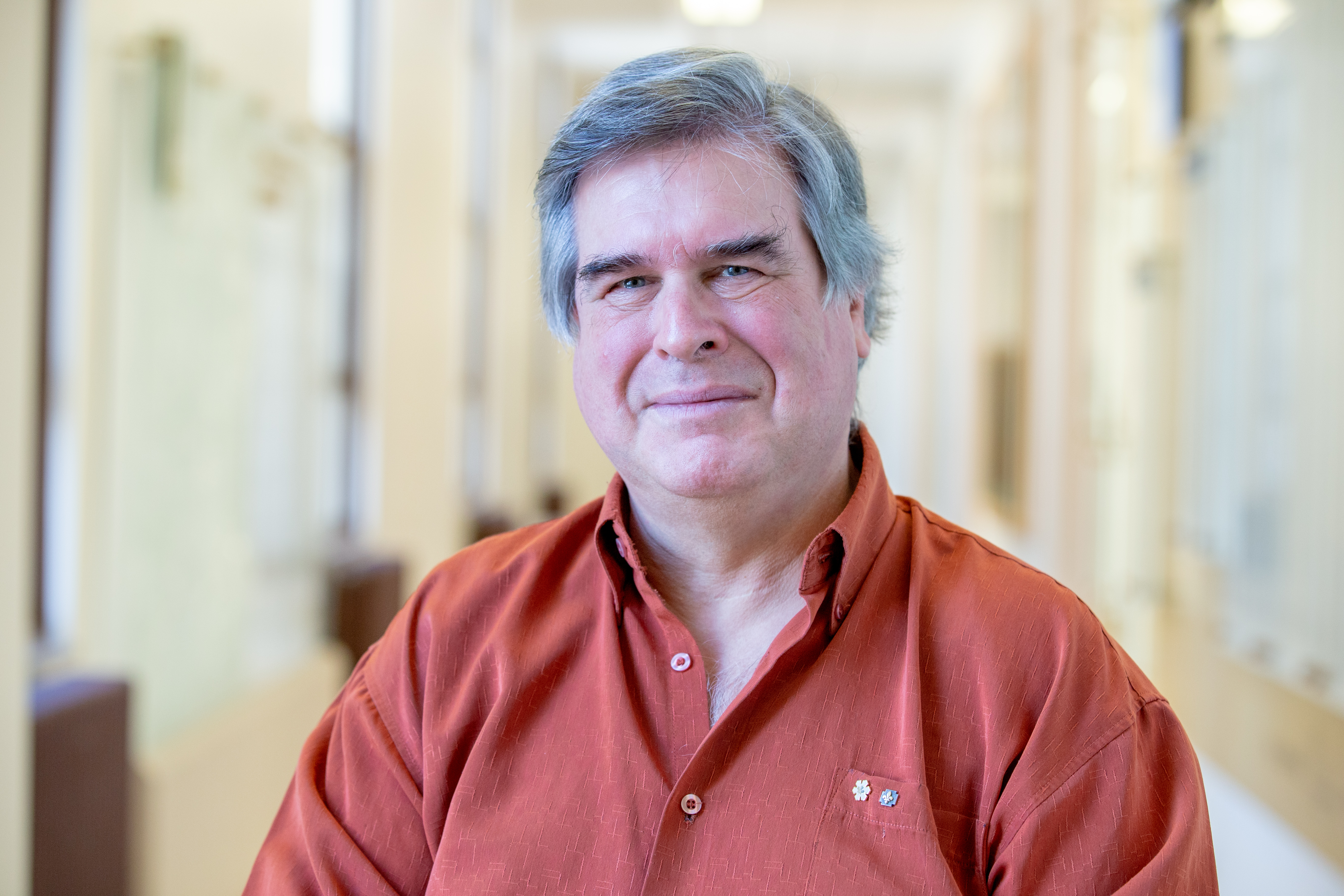 Portrait du cryptologue et professeur de l’Université de Montréal Gilles Brassard.